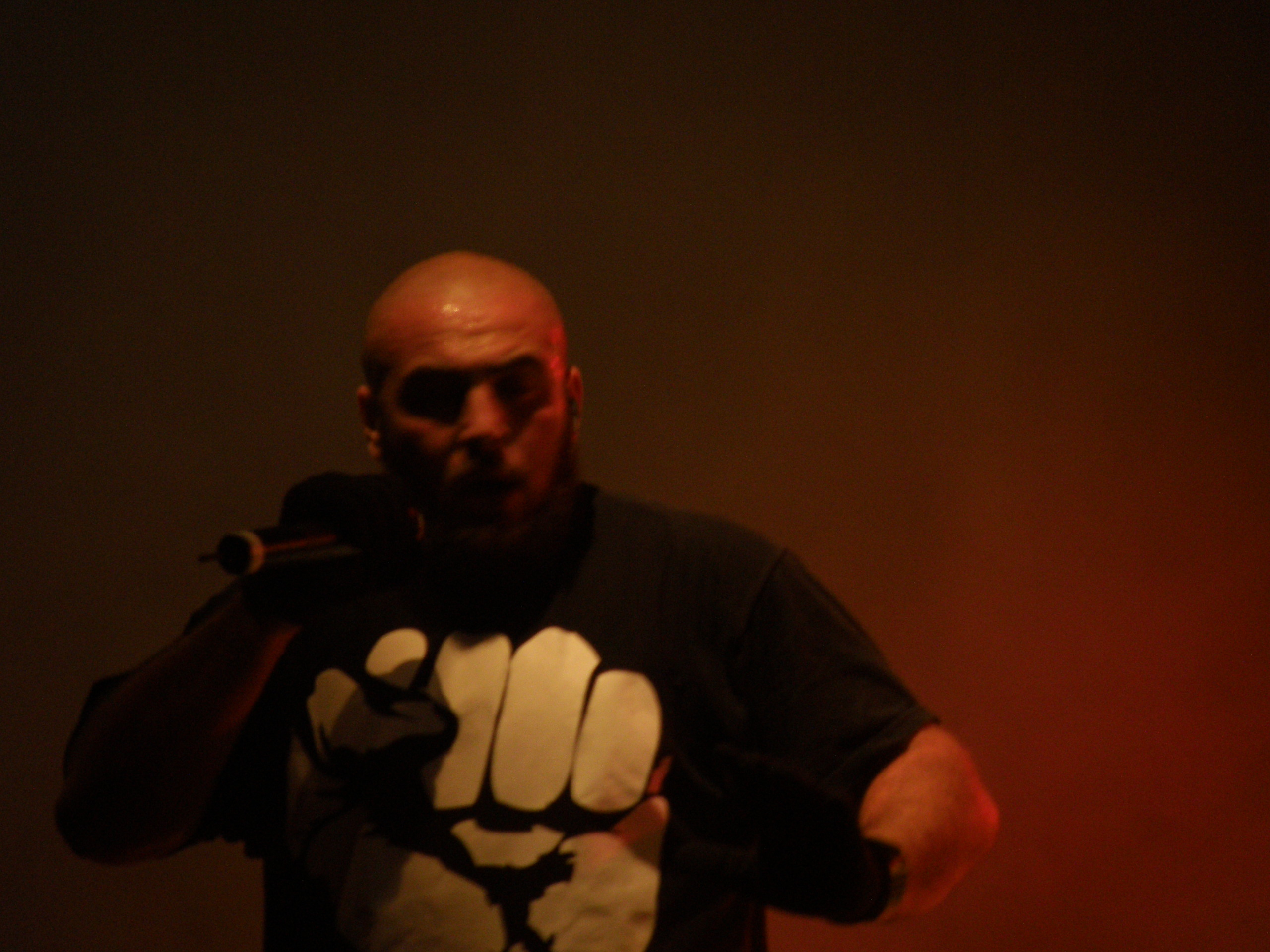 Médine aux Quartiers d'été de Rennes en 2009